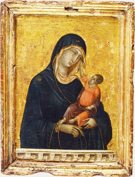 Duccio_madonna_stroganoff_metropolitan.jpg